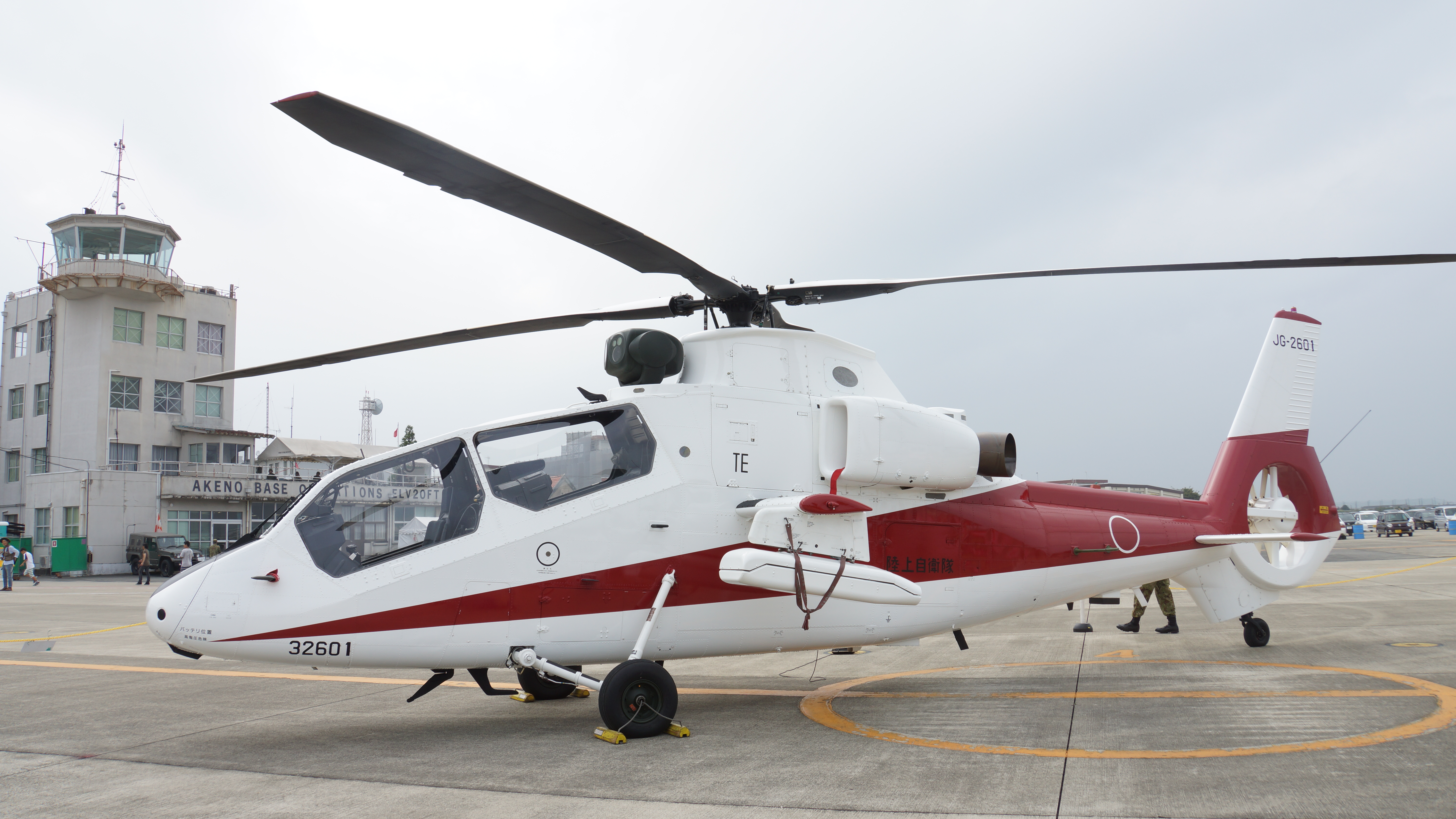 陸上自衛隊 OH-1観測ヘリコプター（32601号機）。2016年10月2日 明野駐屯地にて。